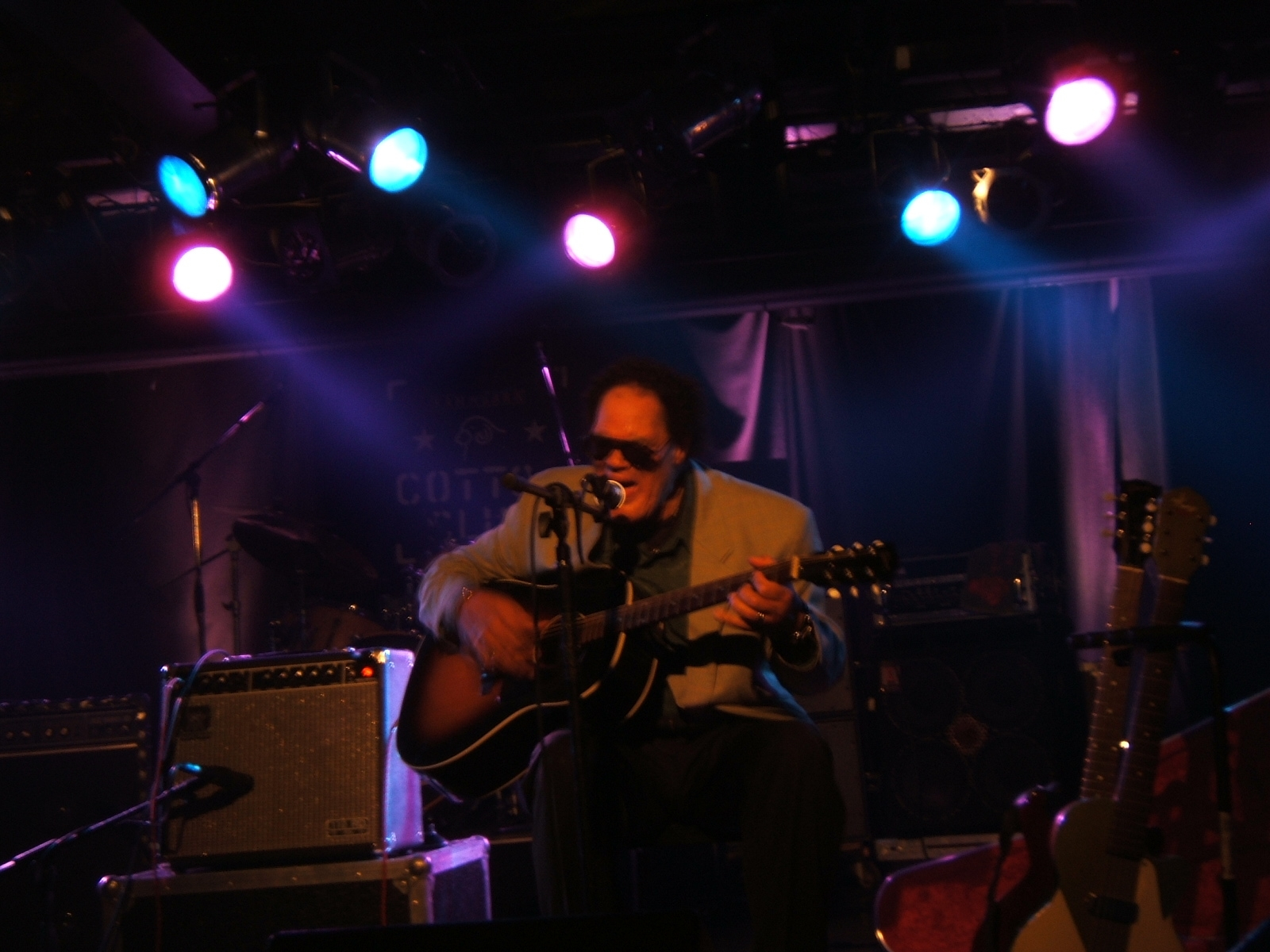 Louisiana Red in the Kammgarn, Kaiserslautern, 2006 / Louisiana Red im Kulturzentrum Kammgarn, Kaiserslautern 2006